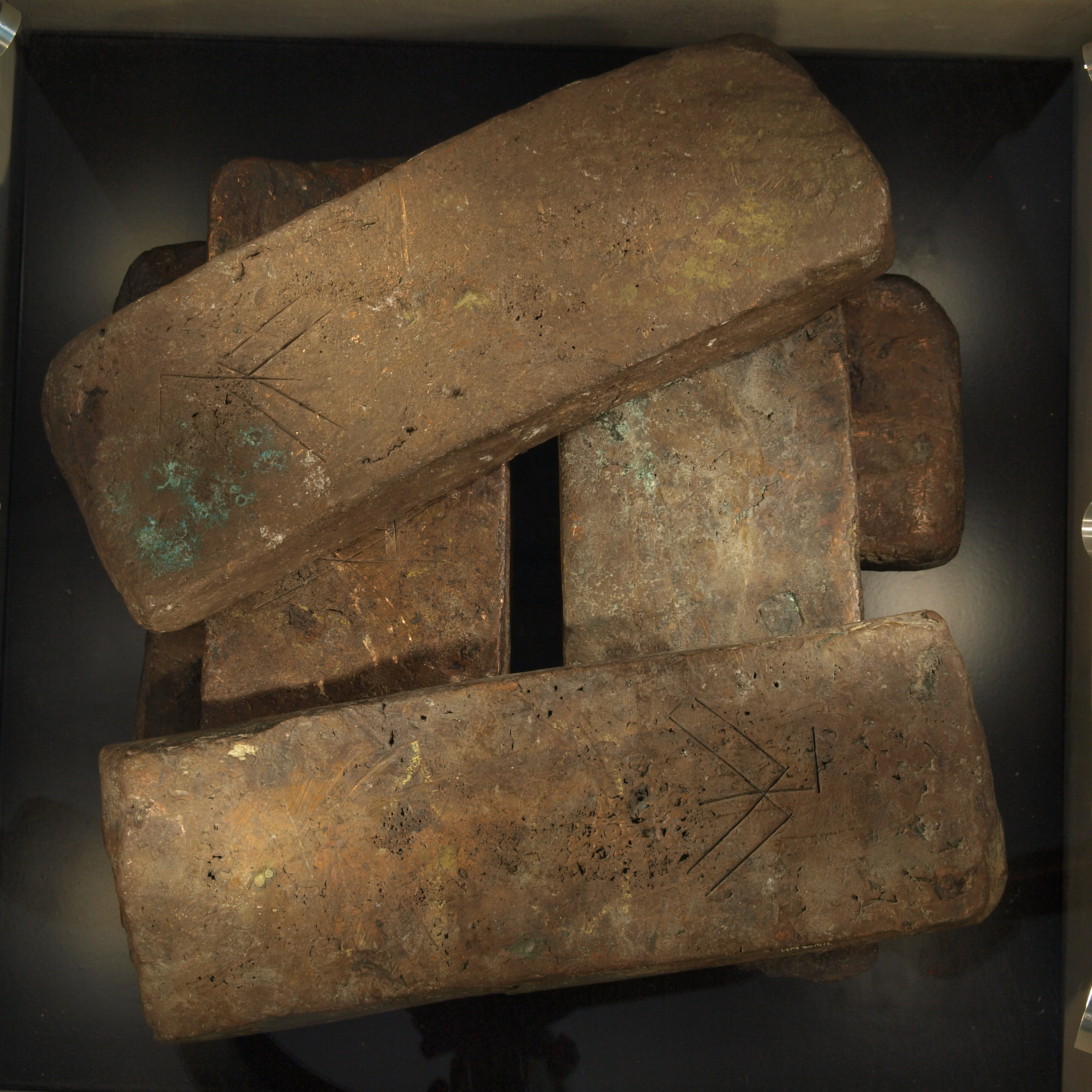 Sechs Kupferbarren von Wittenbergen mit den Stempeln der Hütte von Neusohl und dem augsburger Bankhaus Paller, aus Neusohl, dem heutigen Banská Bystrica in der Slowakischen Republik . Gefunden 1981 aus einem im 17. Jahrhundert gesunkenem Segelschiff aus der Elbe bei Wittenbergen in Hamburg-Rissen, Deutschland. Fotografiert im Archäologischen Museum Hamburg, Deutschland.